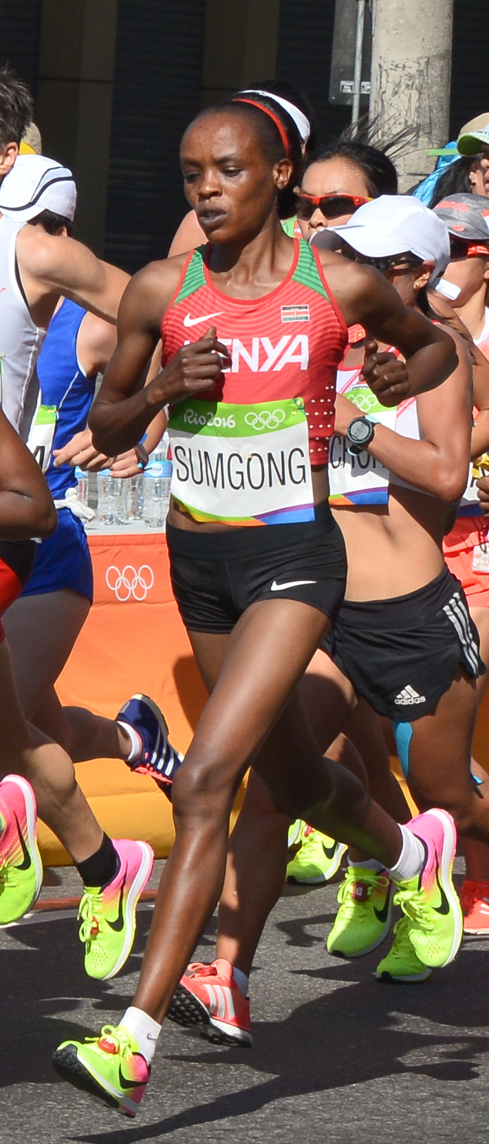 Passage du marathon des jeux olympiques de Rio 2016 dans le centre de Rio